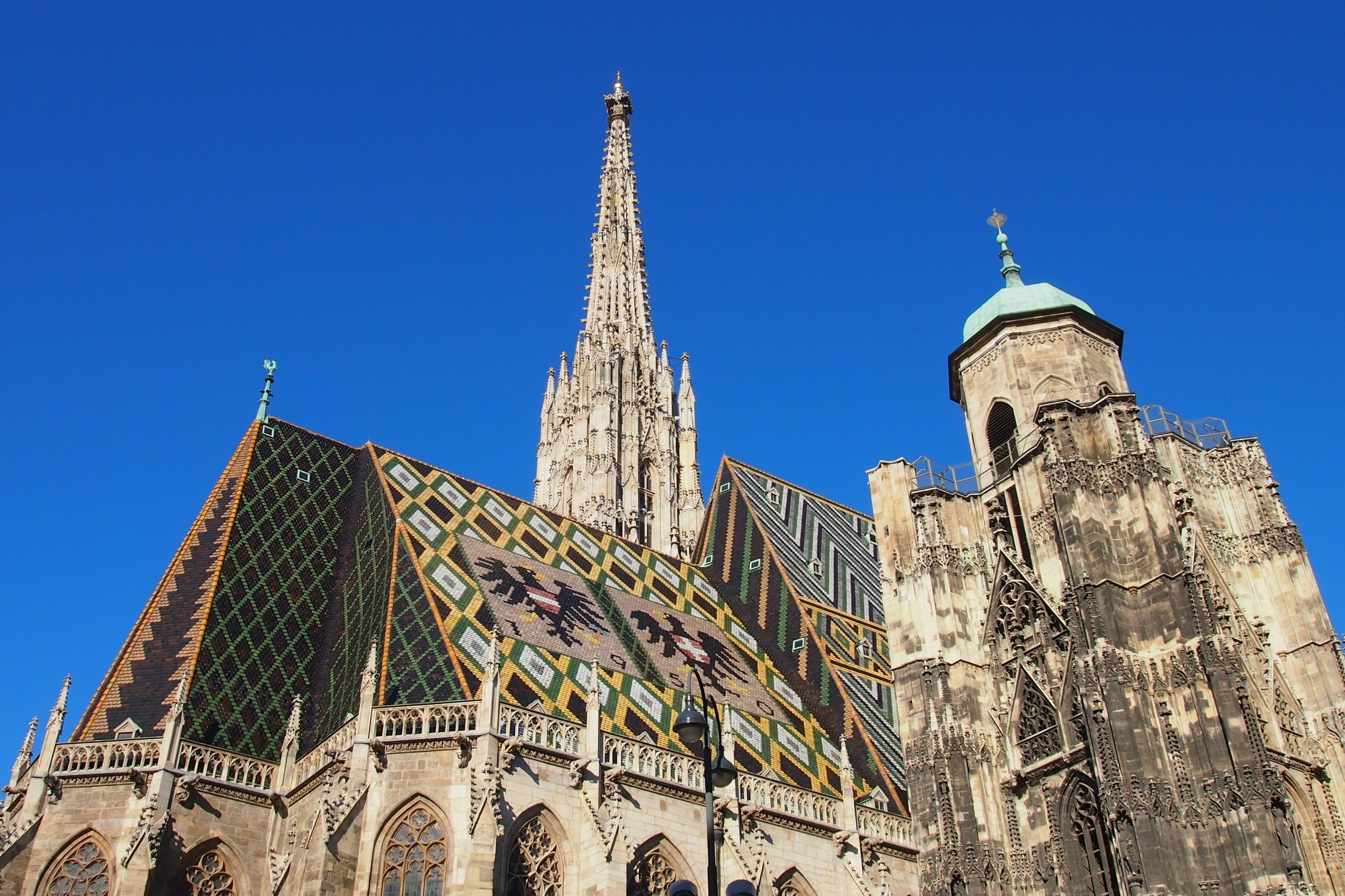 Der Stephansdom in der Wiener Innenstadt